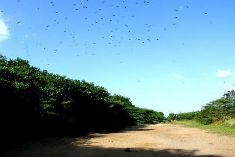 parque añu